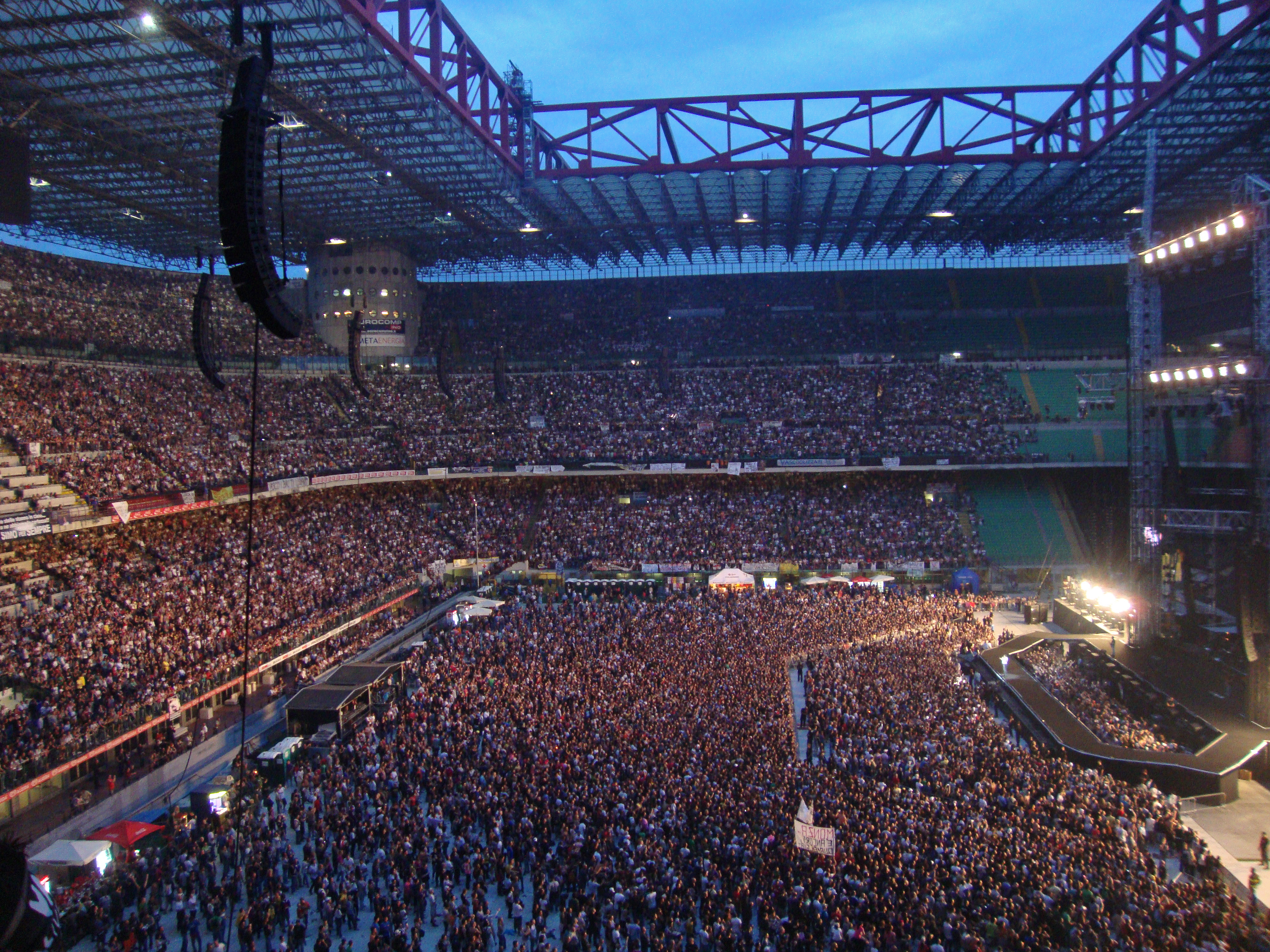 Vasco Rossi Live Kom 2011 Tour San Siro, Milano Italia